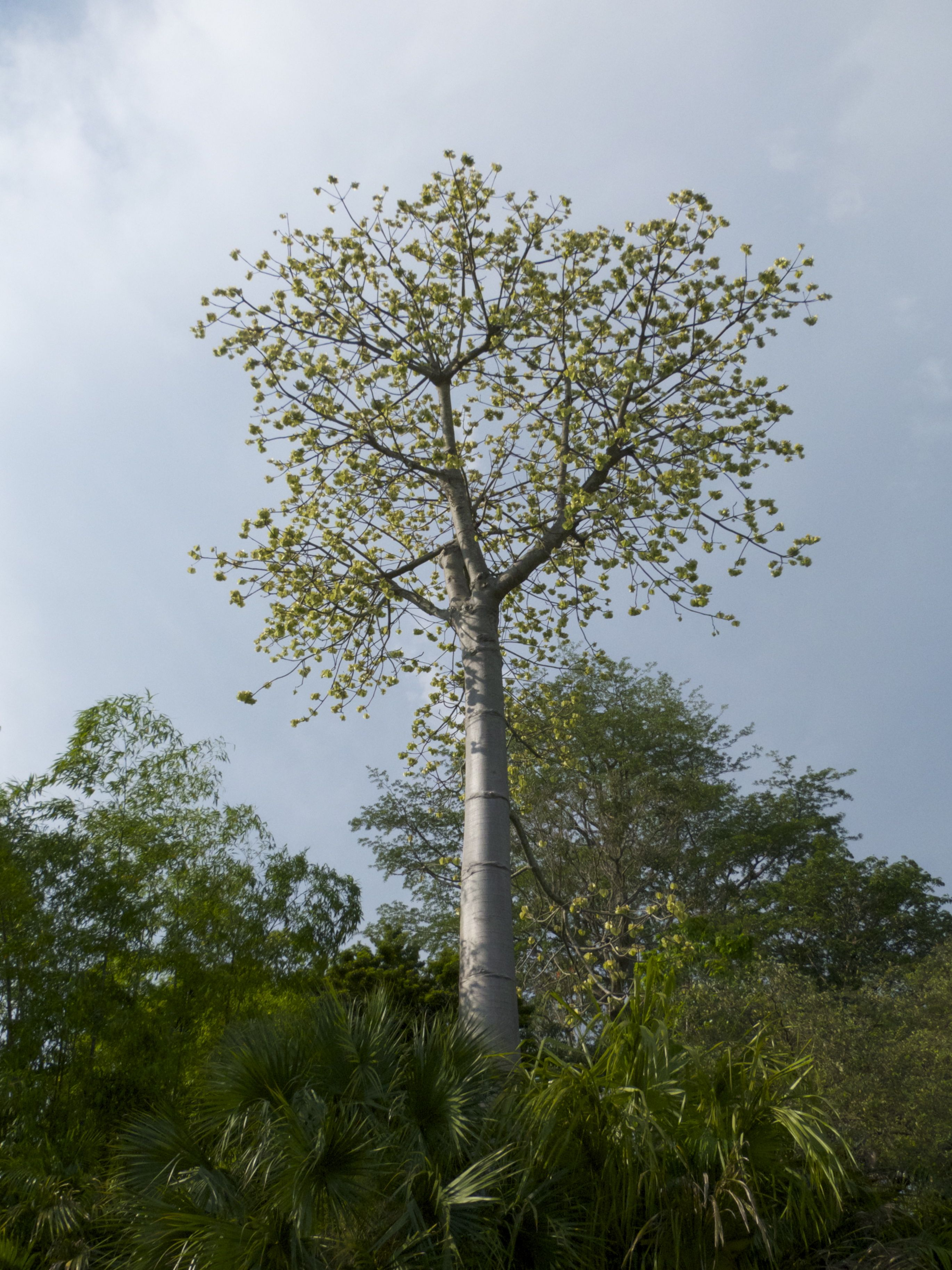 Quipo Tree Flamingo Gardens May 9, 2012.